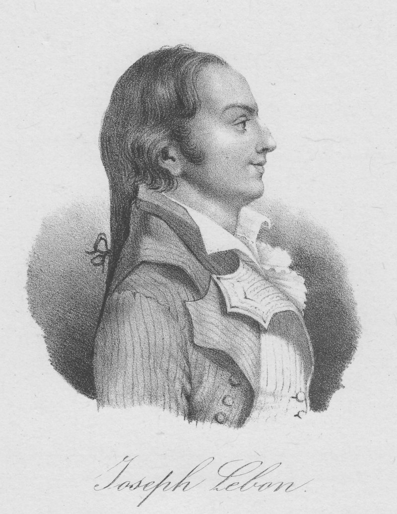 Portrait Joseph Le Bon, Lithographie um 1820